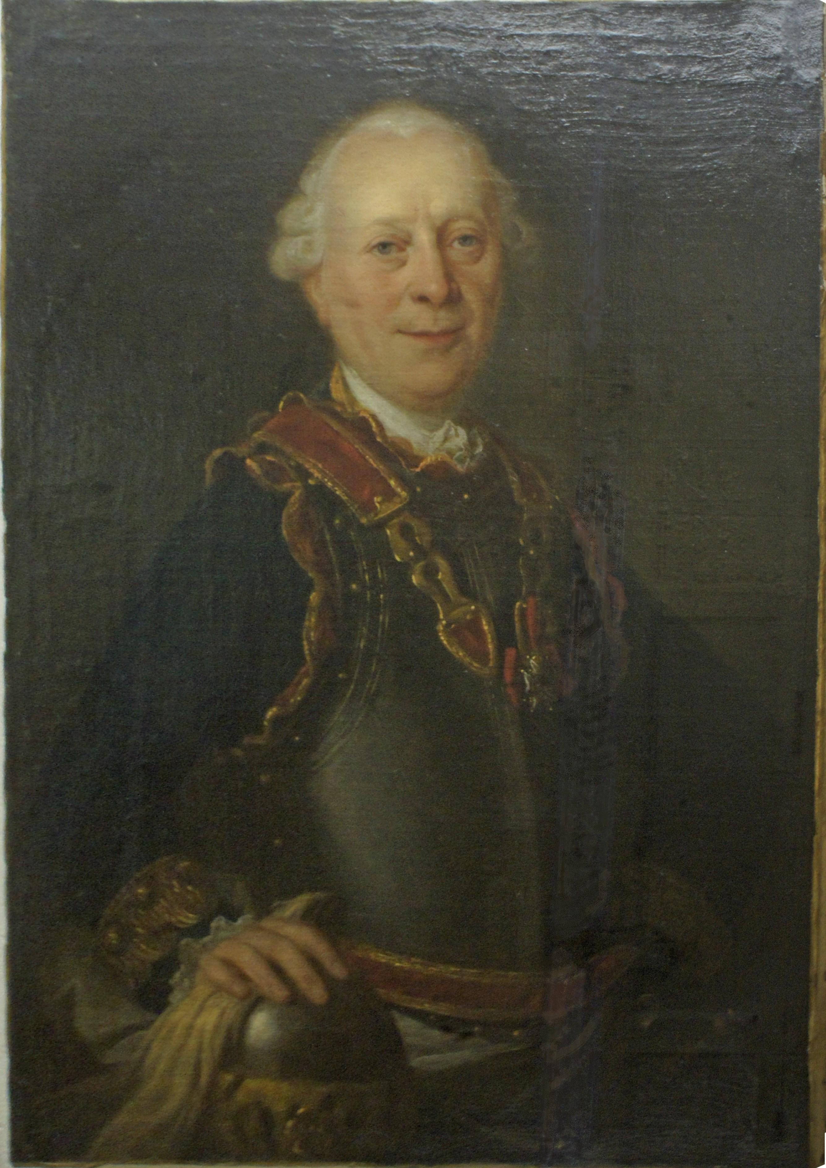 Salle militaire au musée saint Remi. Claude Etienne Bidal vicomte d'Asfeld 1719 1793 .